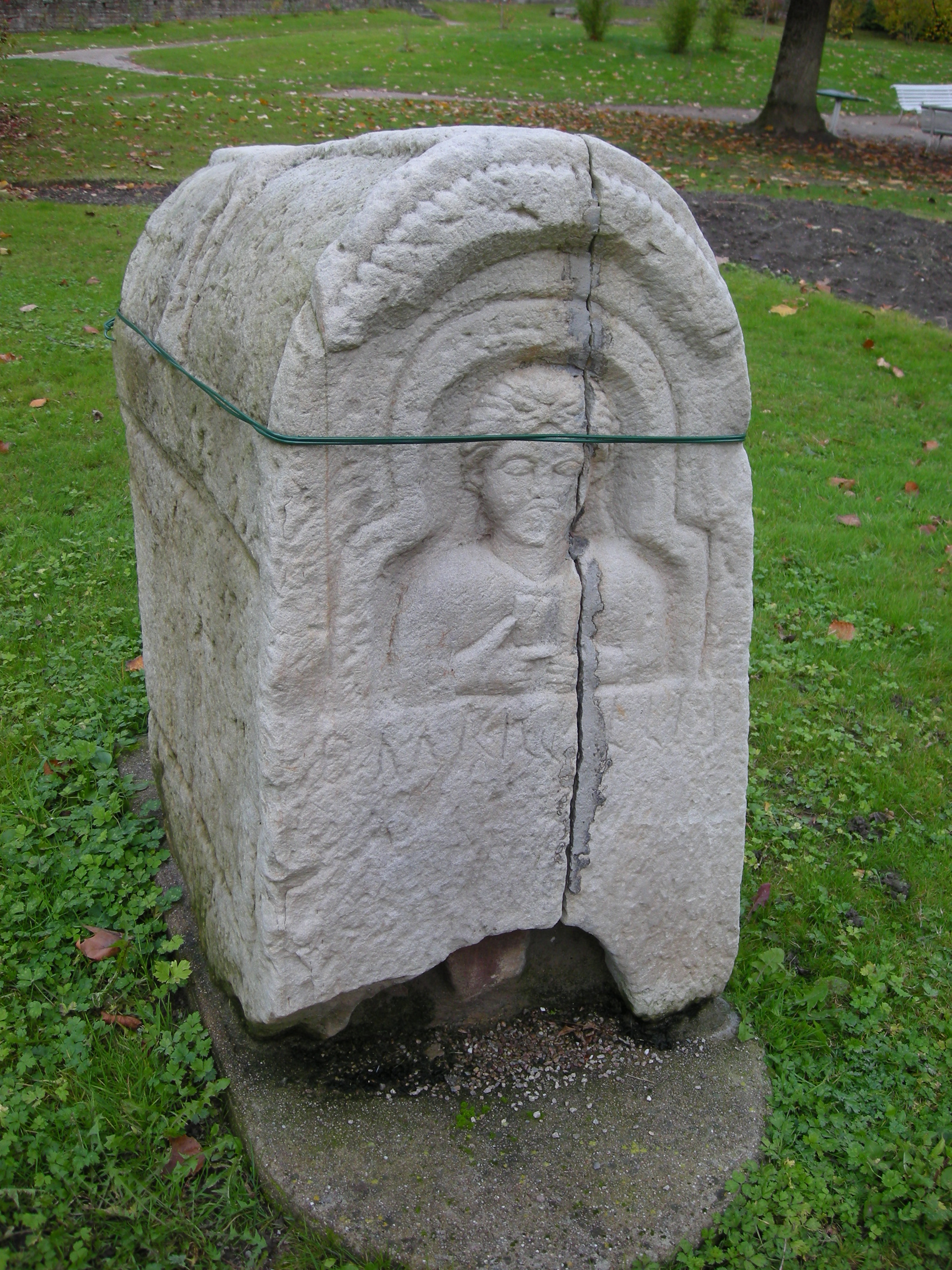 Stèle gallo-romaine Bains-les-Bains, actuellement dans le parc Saint-Colomban. Selon la Carte archéologique de la Gaule - Les Vosges 88, p. 104 : Selon Toussaint, D(iis) (Manibus) RICCIIIII (?), selon J.-N. Castorio, D(iis) M(anibus) RIG[---]LLI[-].